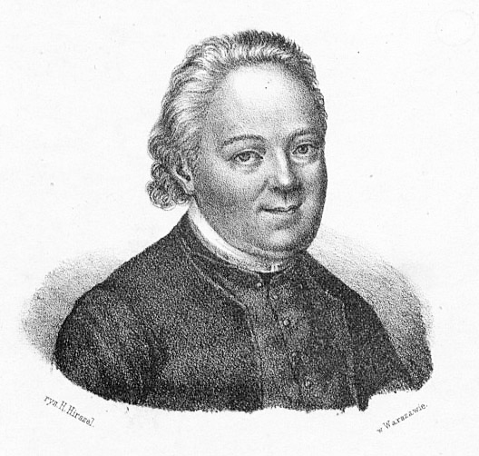 Беларуская (тарашкевіца): Партрэт Францішка Багамольца (Francišak Bahamolec)